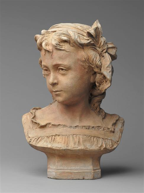 Marie Carrier-Belleuse, fille de l'artiste